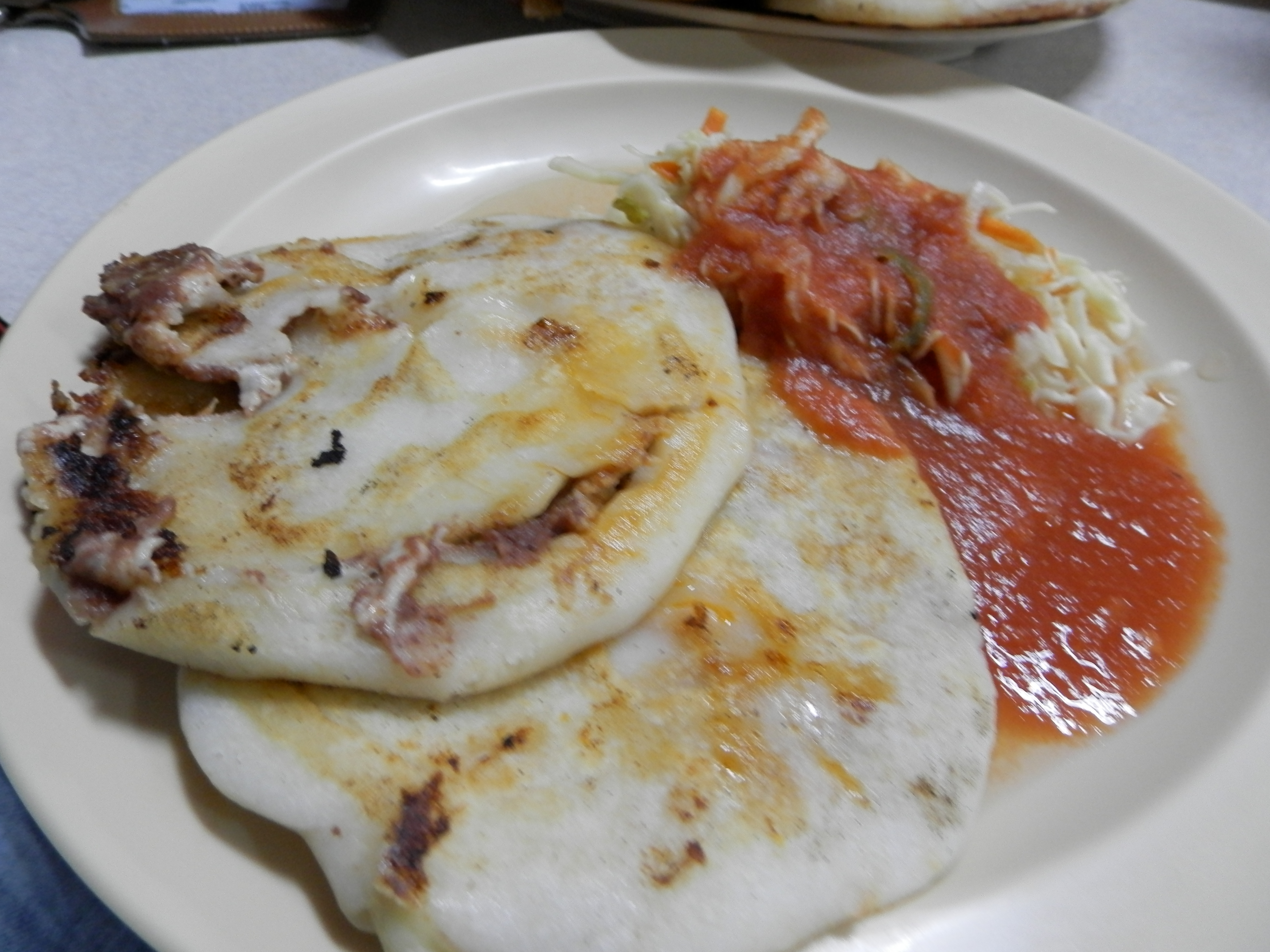 Degustando un plato típico de El Salvador